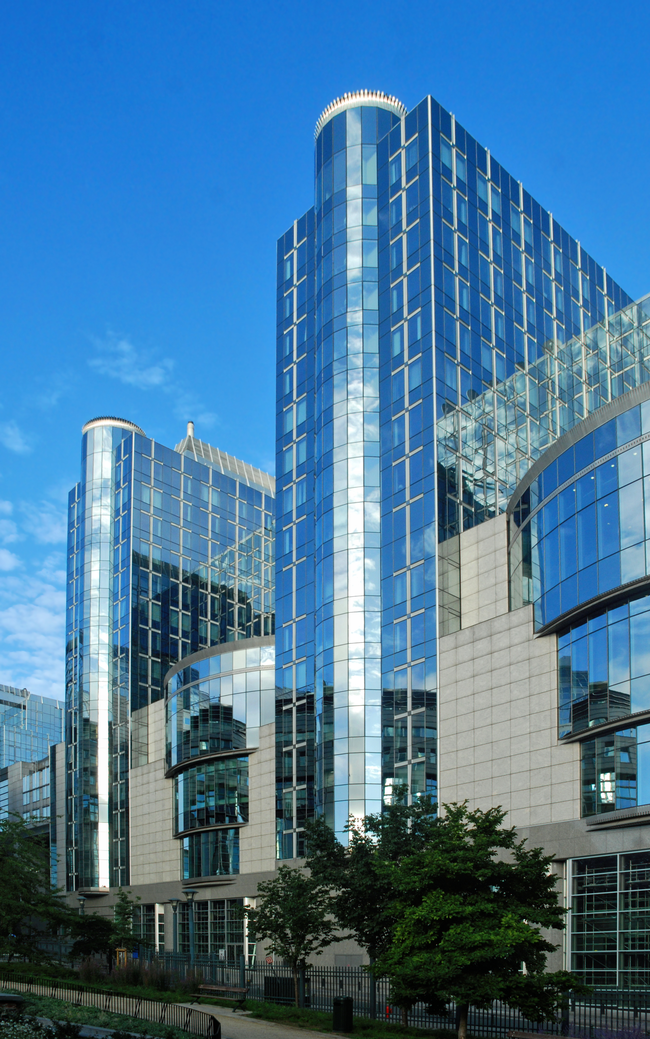 Belgique - Bruxelles - Parlement européen - arrière du bâtiment Altiero Spinelli (Architecture postmoderne en Belgique - Atelier d'architecture de Genval - 1987-2004)